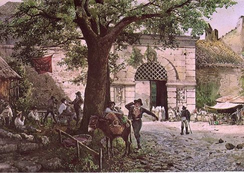 Porta Angelica in Rome (rione Borgo)